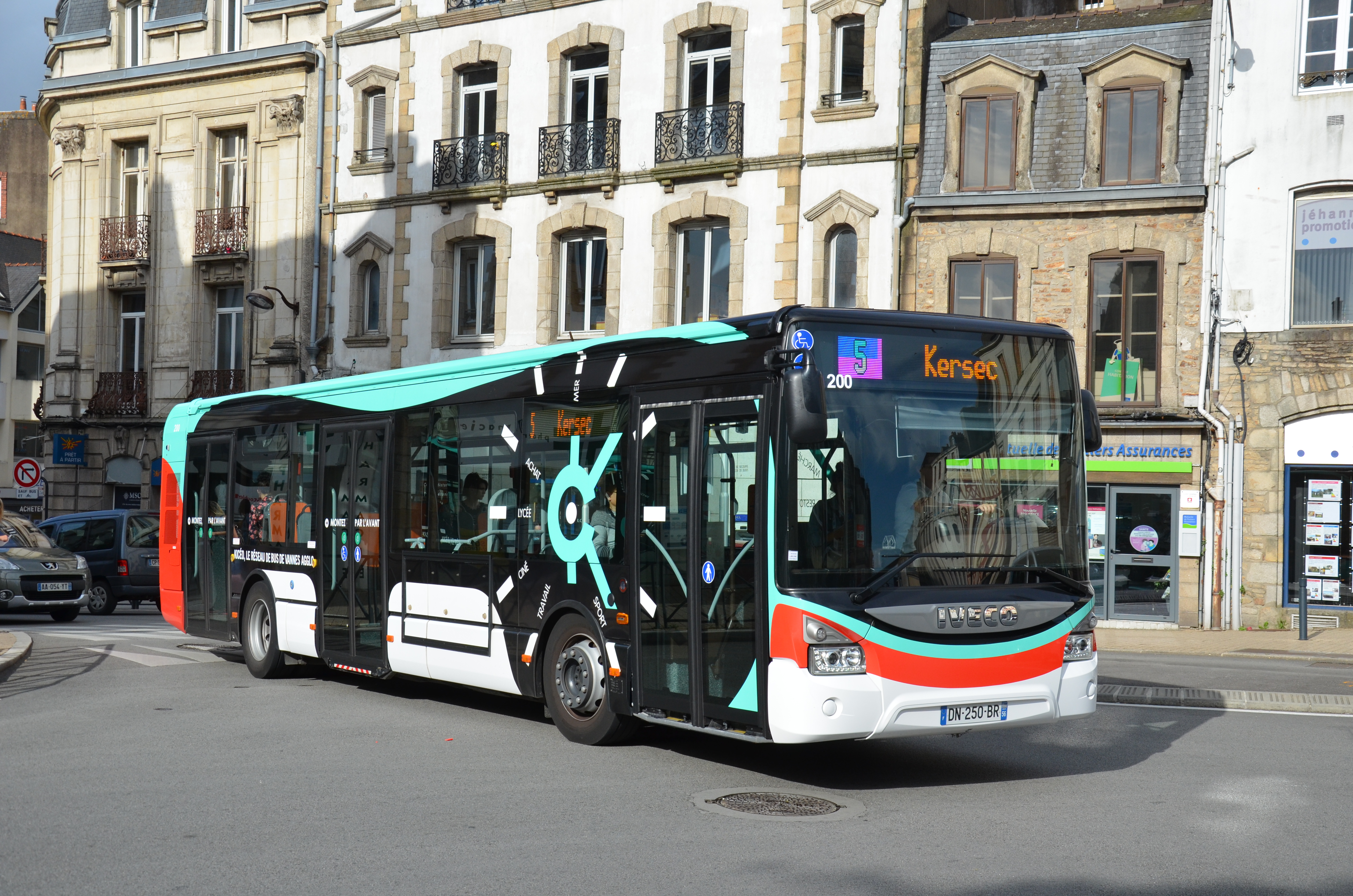 Iveco Urbanway 12 n°200 en approche de l'arrêt Hôtel de Ville, sur le réseau Kicéo de Vannes.